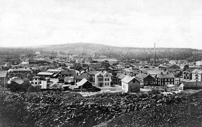 Kopparbergs samhälle i början av seklet. Foto efter gammalt vykort.